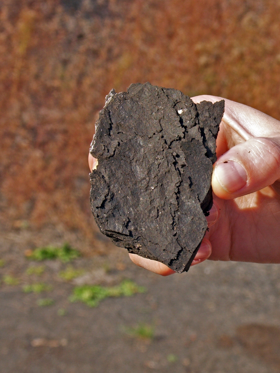 Ausgetrockneter Ölschiefer von der Grube Messel Aufgenommen von Fafner